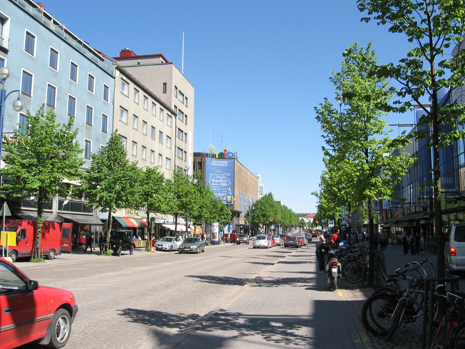 Aleksanterinkatu (Alexander's street), main street of Lahti